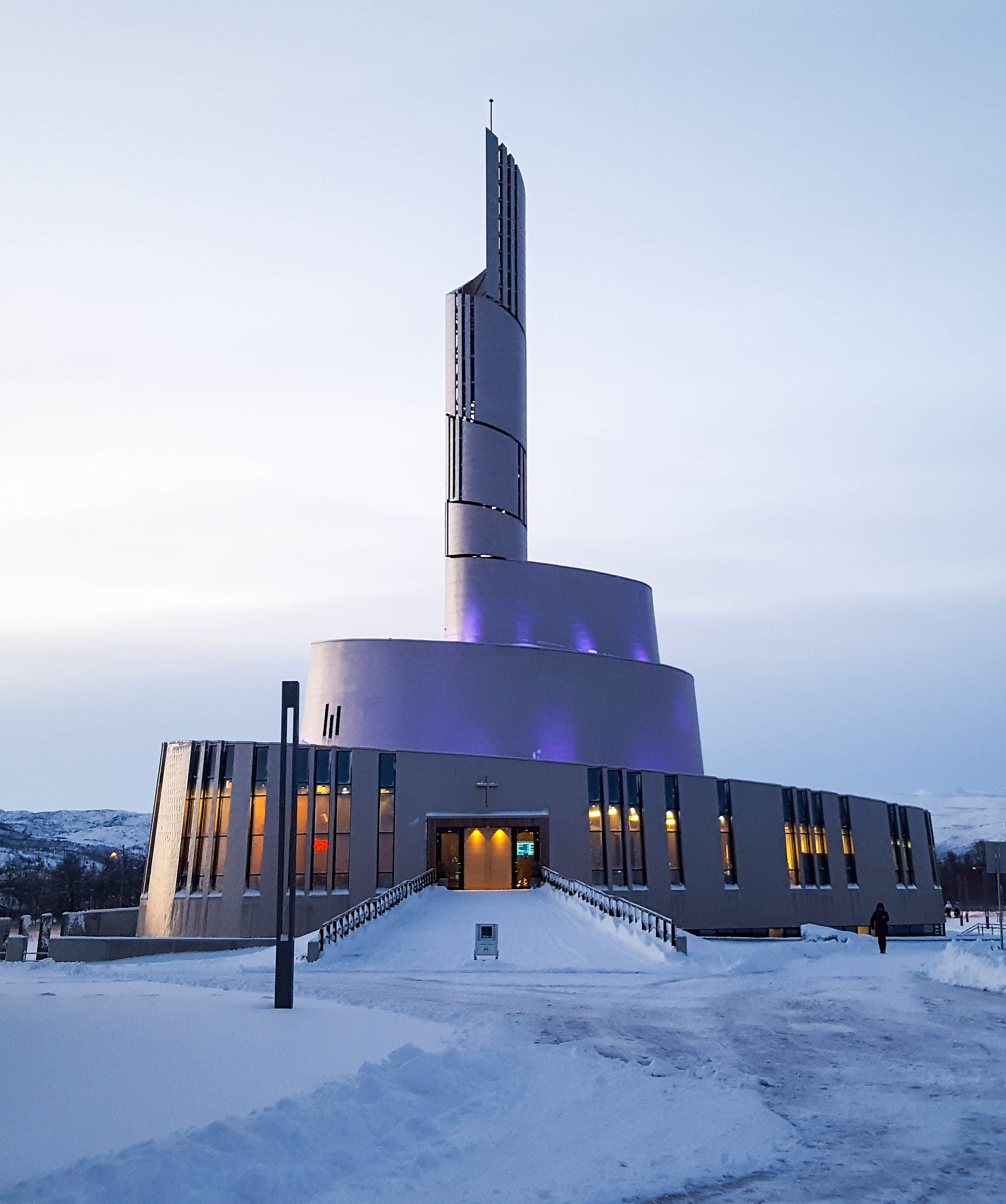 Nordlyskatedralen fra utsiden om vinteren.